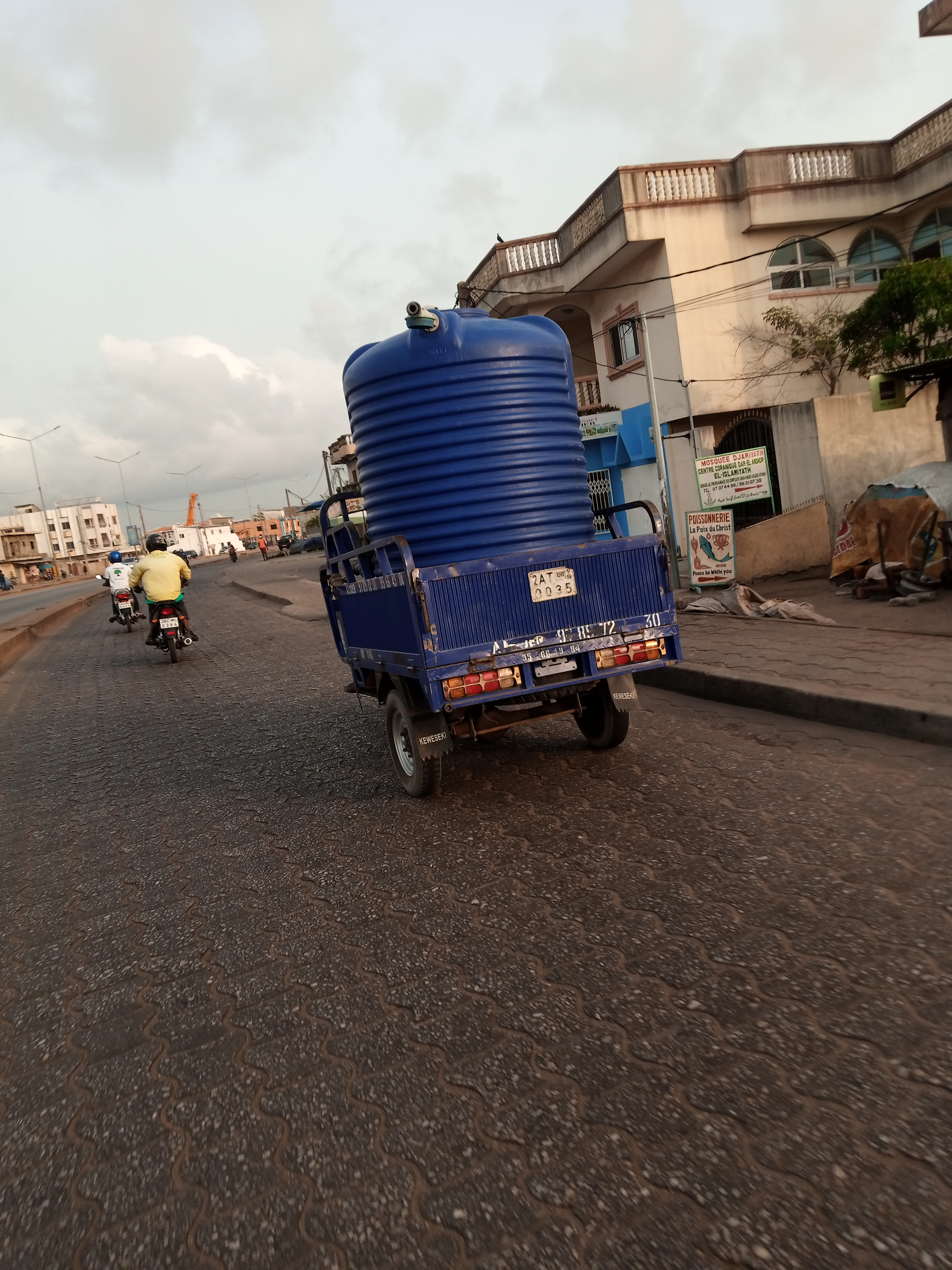 le transport à Cotonou au Bénin This is an image with the theme "Africa on the Move or Transport" from: Benin